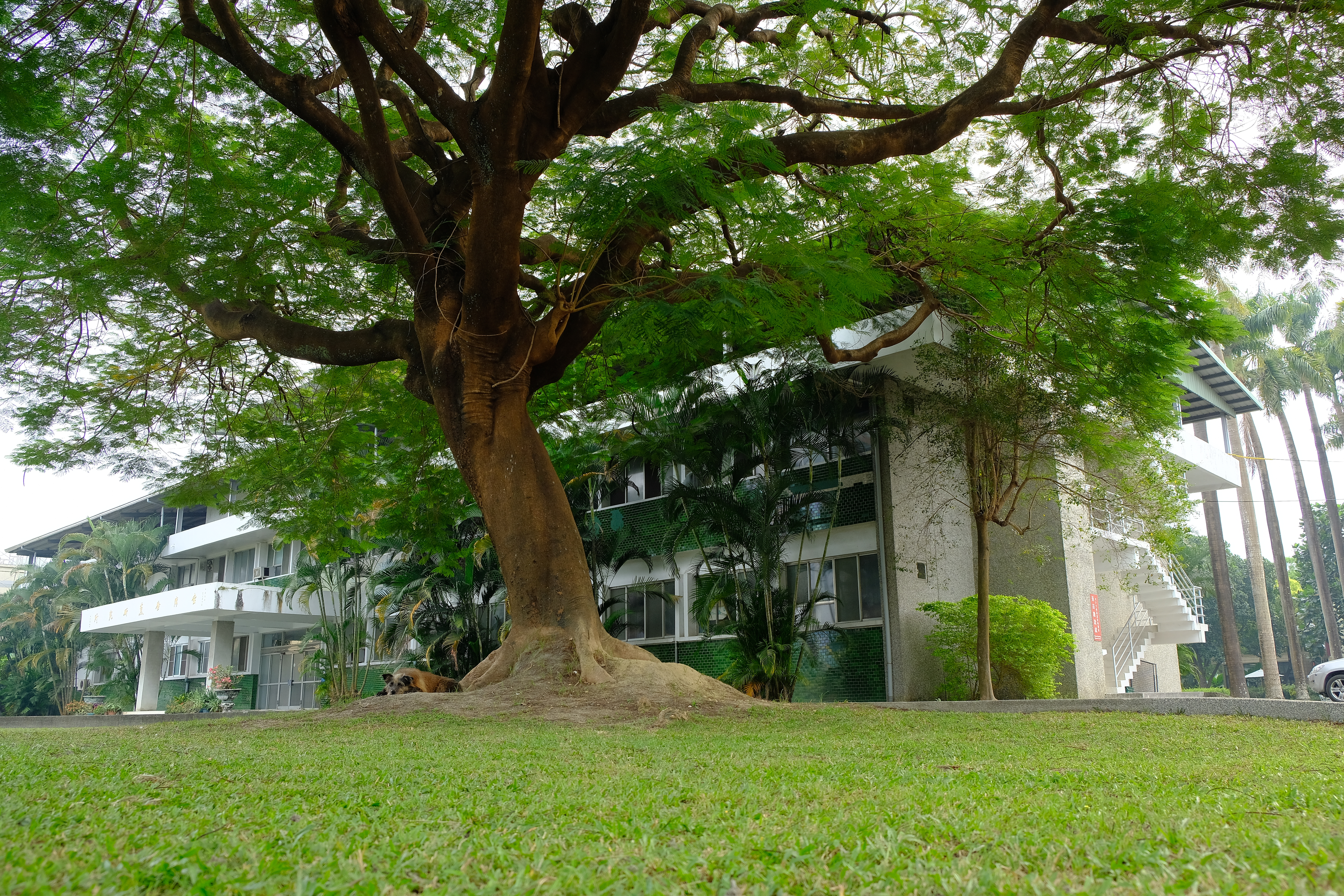 2018 Taiwan Banana Research Institute 研究暨行政大樓 財團法人香蕉研究所